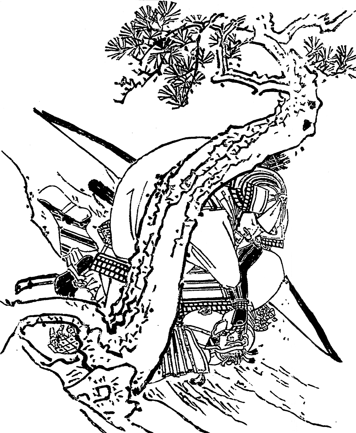 佐奈田義忠（真田義忠）。平安時代末期の武将。／江戸時代『前賢故実』より。画：菊池容斎